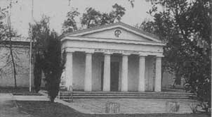 EL PARTENON DE LA QUINTA NORMAL (Se empezó a construir en 1884) Fue el segundo recinto donde funcionó el Museo Nacional de Bellas Artes, entre los años 1887 - 1910.